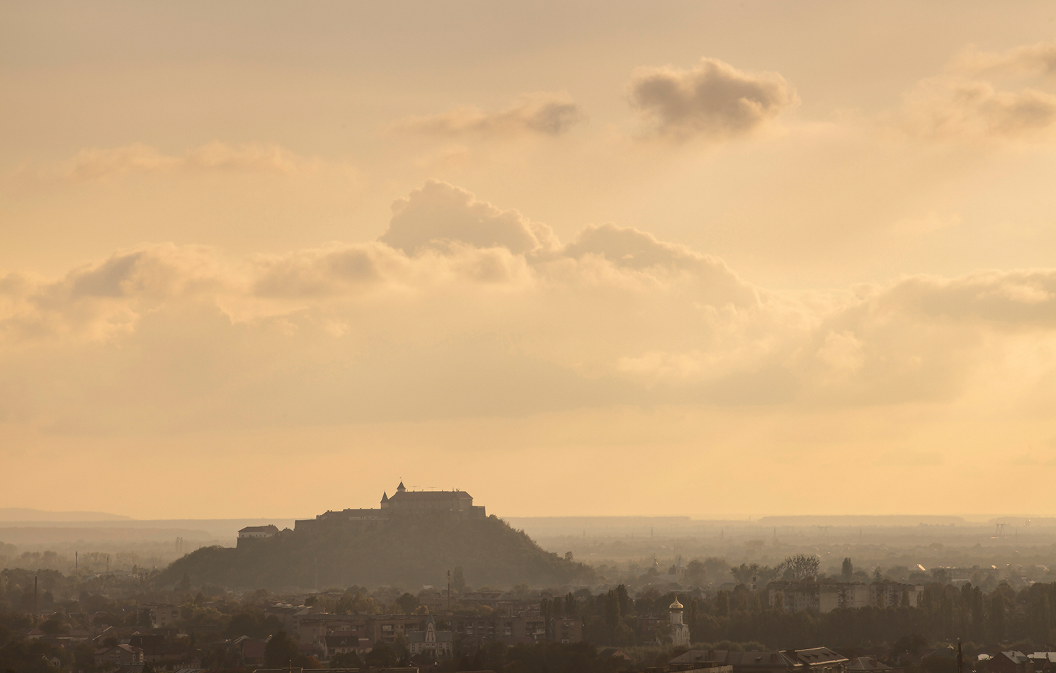 Замок "Паланок" (мур.), Мукачеве, Замкова гора